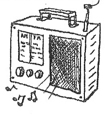 Das Kofferradio